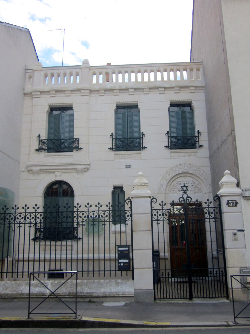 Façade de la synagogue de Tours, rue Parmentier, Tours, Indre-et-Loire, France